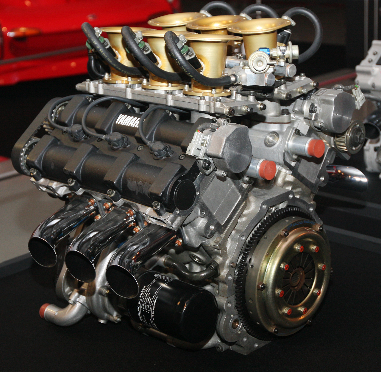 1985–1986 Yamaha OX66 engine